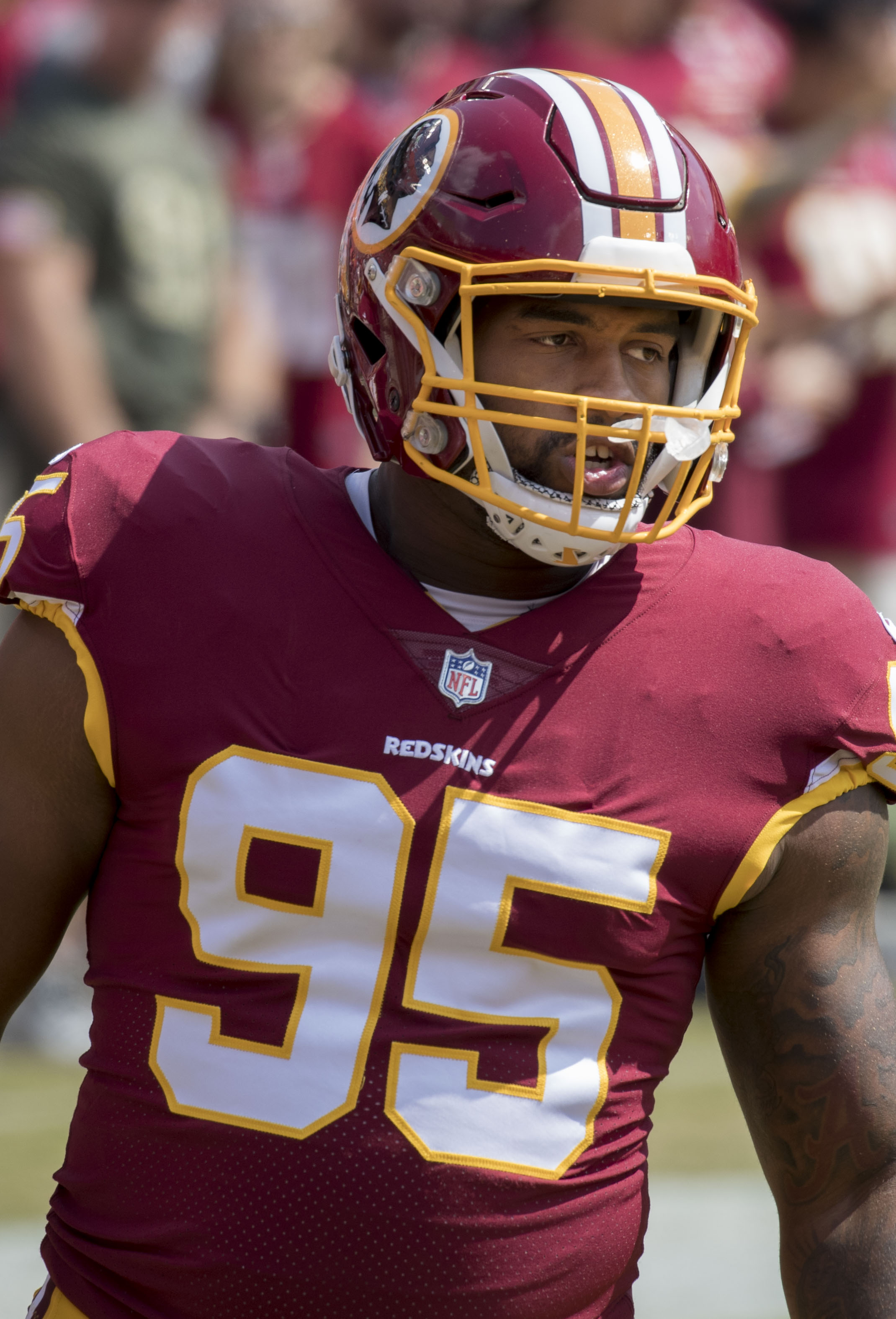 Eagles at Redskins 9/10/17